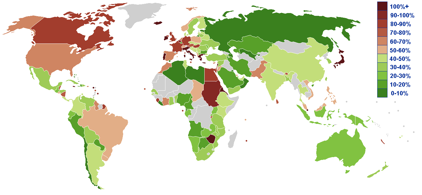 Öffentliche Bruttoverschuldung in Prozent des Bruttoinlandsproduktes BIP (2012)